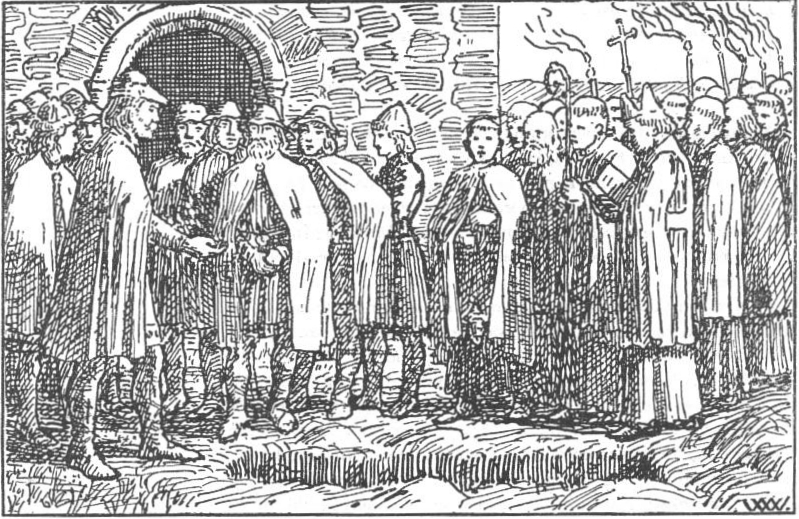 Wilhelm Wetlesen: Illustration for Harald Hardrådes saga, Heimskringla 1899-edition. nn: «Kong Harald ved grava til Ulv stallare.»